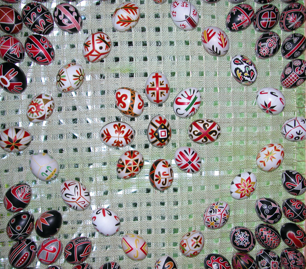 Колекція писанок Східного Поділля роботи Оксани Білоус